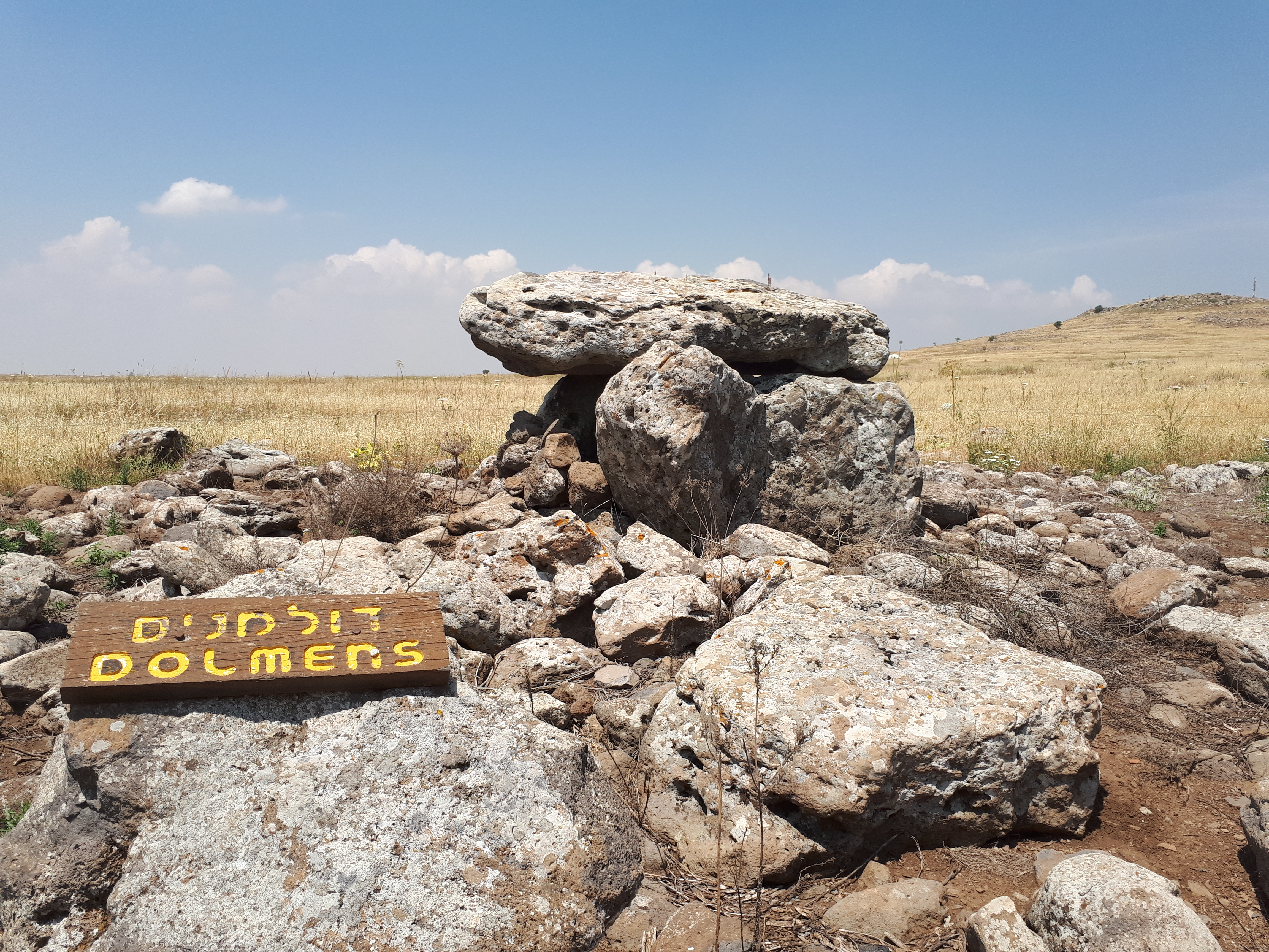 גמלא הייתה עיר ברמת הגולן שחרבה במרד הגדול בסוף ימי הבית השני